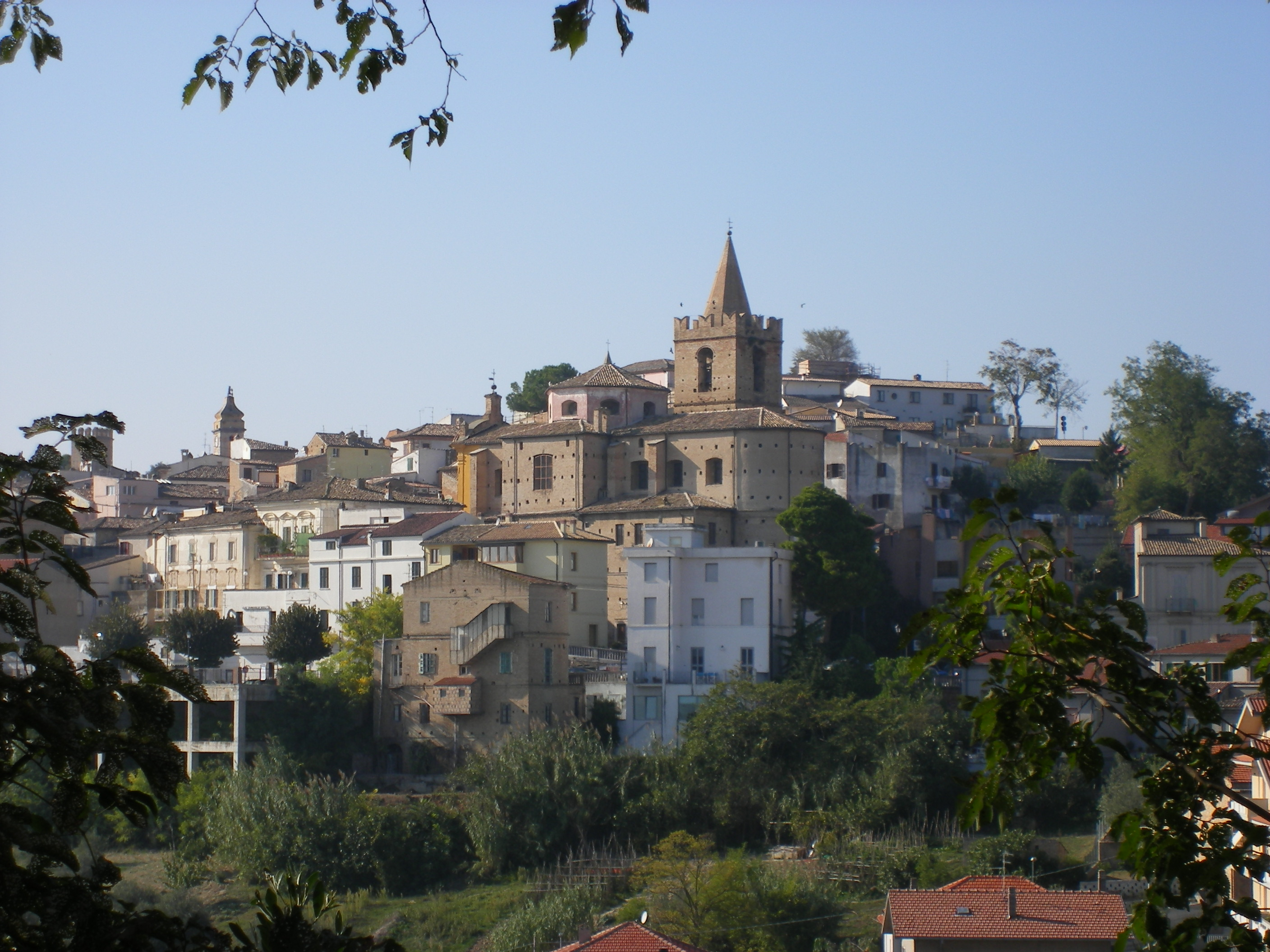 Spoltore. Centro storico di giorno